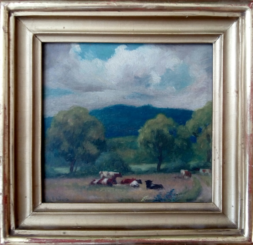 Stádo na poli